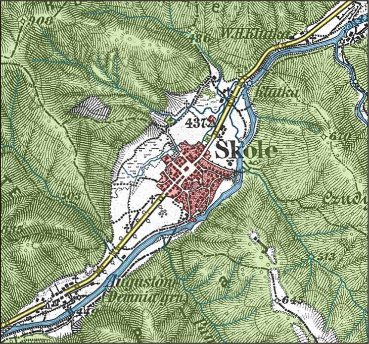 Топомапа Сколе за 1877 рік